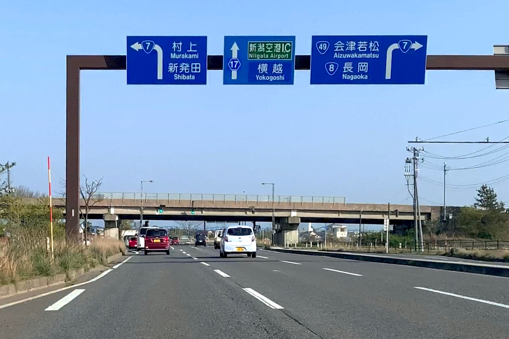 新潟県道17号新潟村松三川線 一日市IC空港アクセス道路として建設された区間（新潟市東区津島屋，2020年4月）